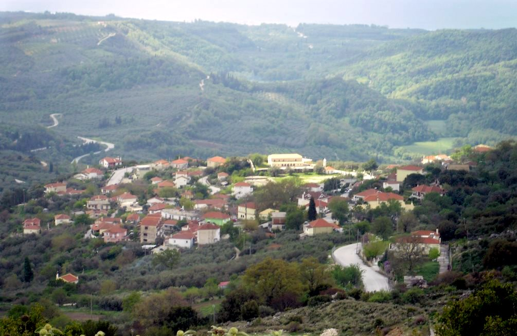 Φωτογραφία του χωριού Καμαρίνα.